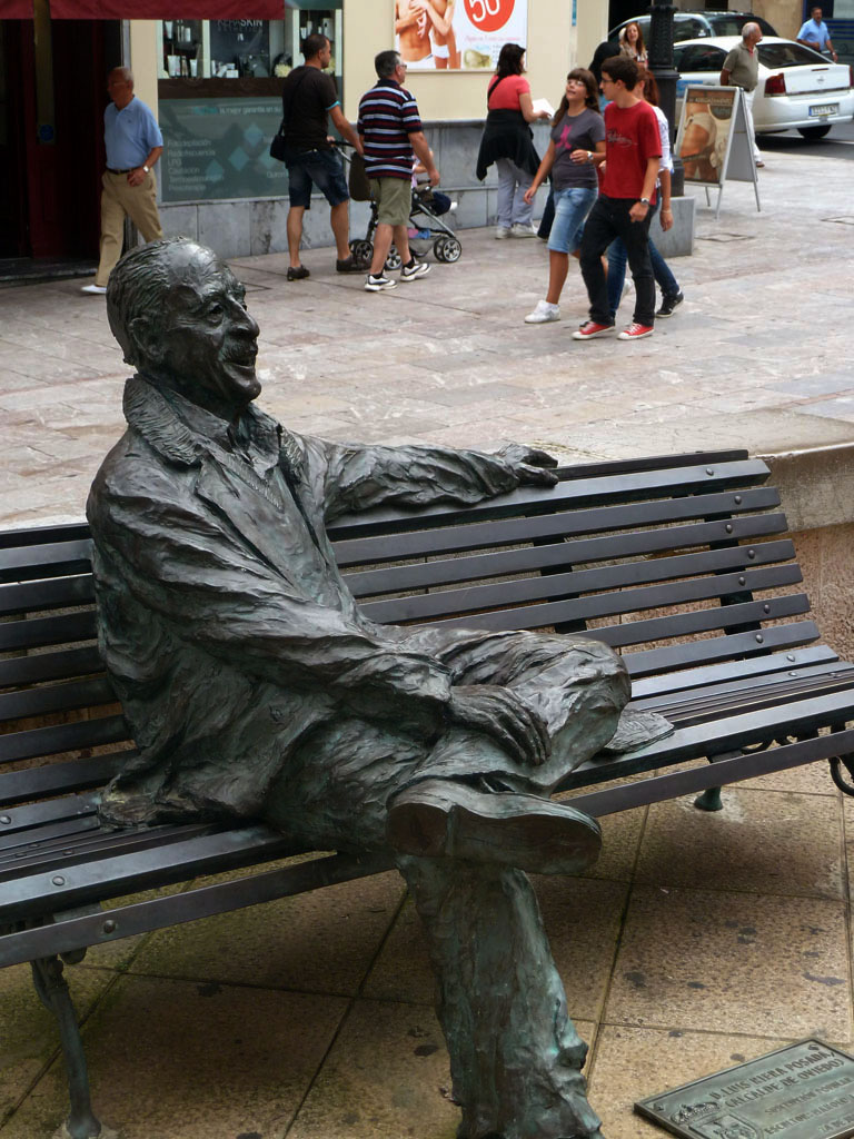 Oviedo